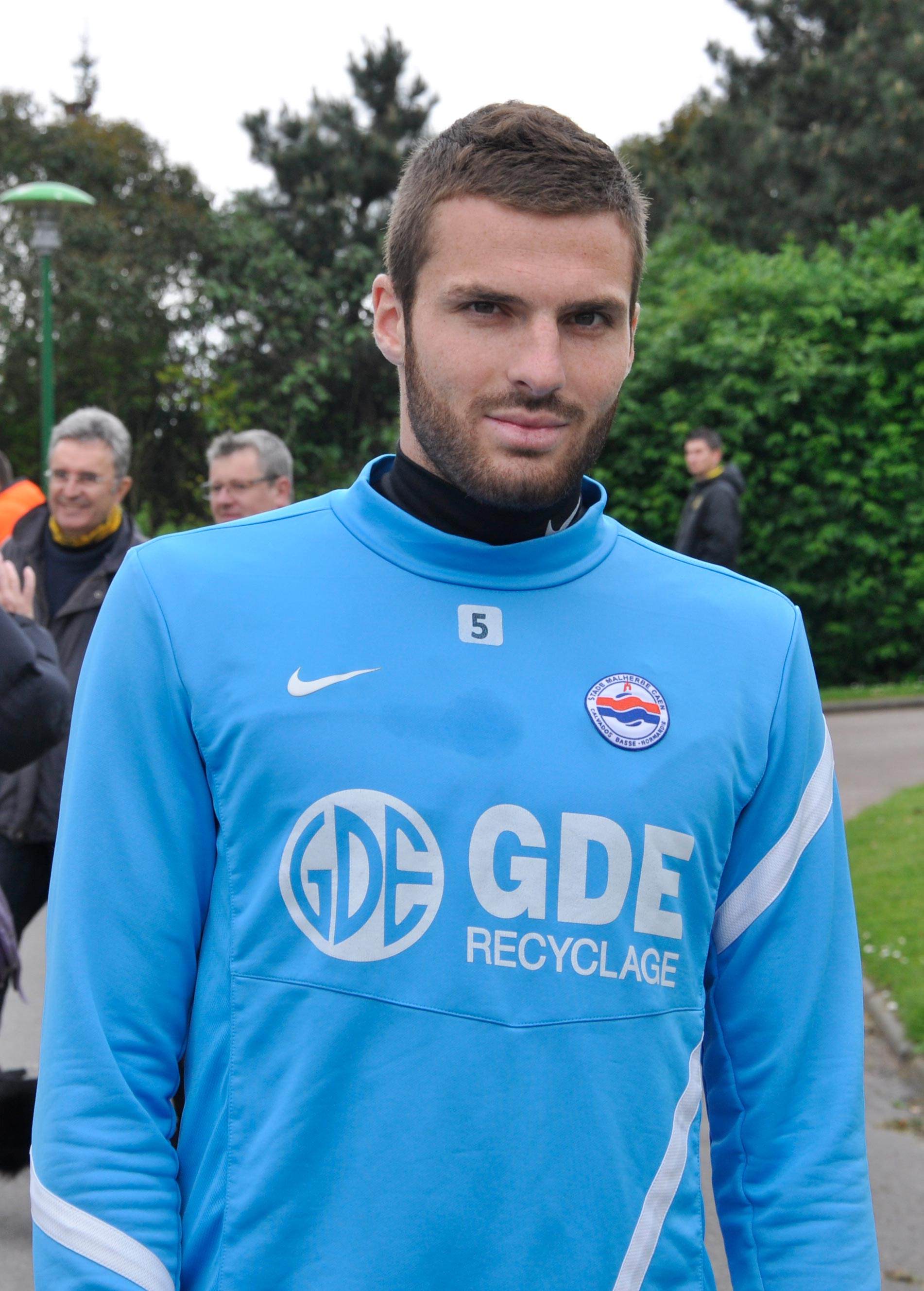 Thomas Heurtaux lors d'une entraînement du Stade Malherbe Caen